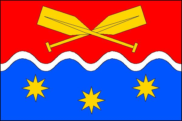 Vlajka obce Krhanice